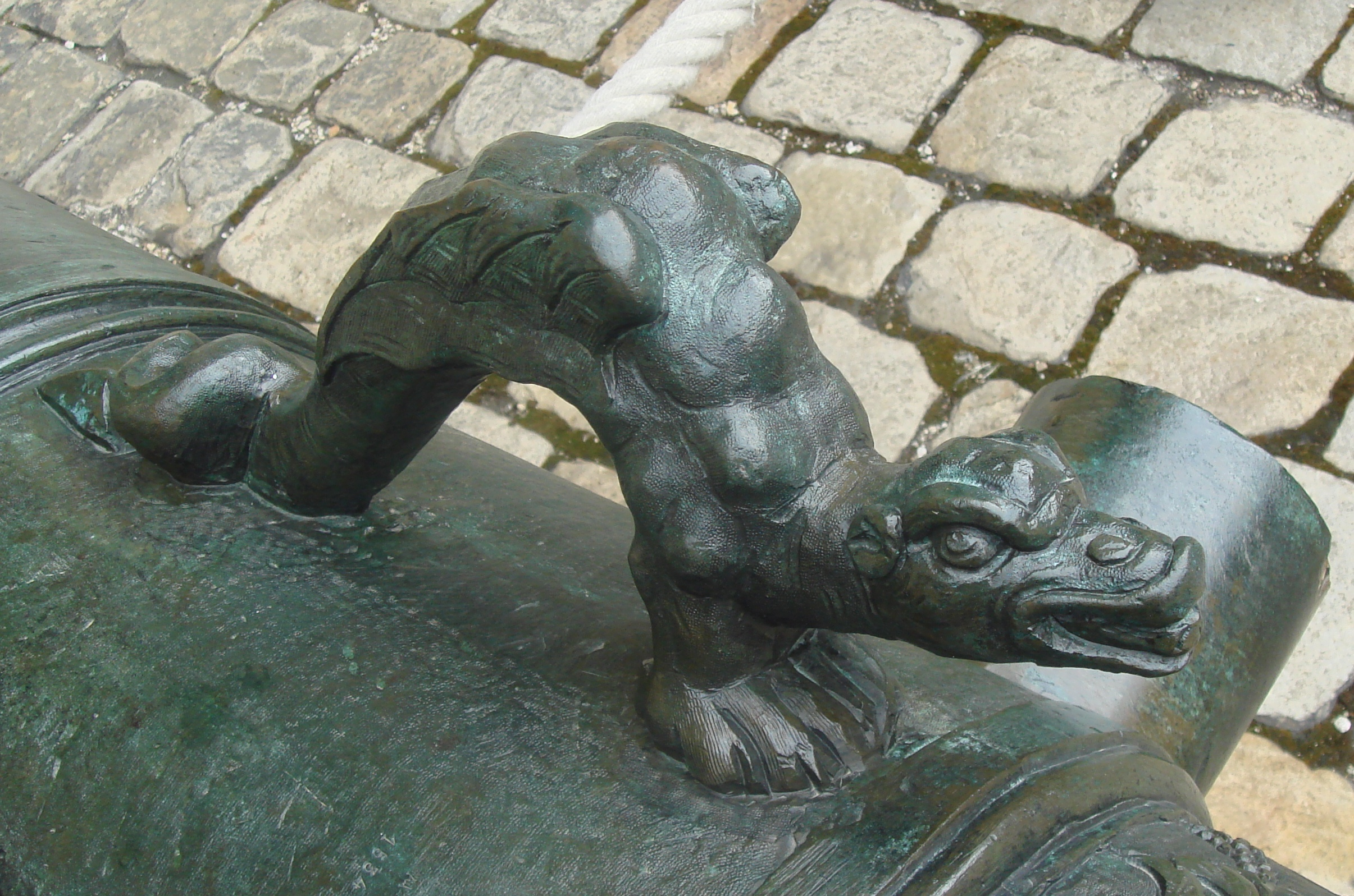 Dragon handle on Keller Canon de 24 (24-pounder cannon) Le Protecteur